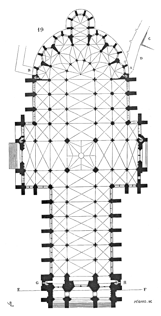 Der ursprüngliche Grundriss der Kathedrale von Amiens mit quadratischen Türmen, später verkürzt entlang der Linie E-F, und ohne die später angefügten Kapellen am Langhaus.